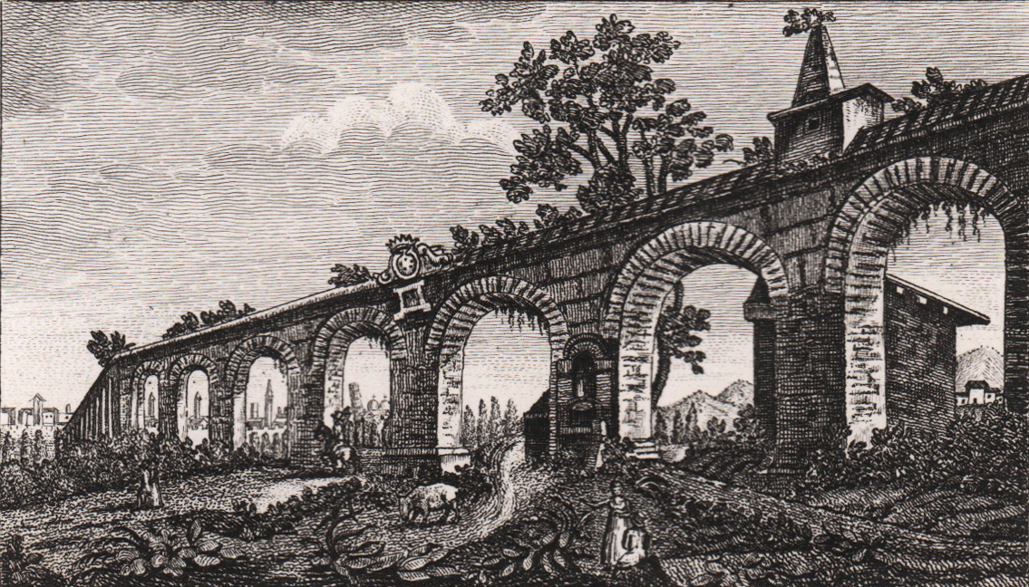 Illustrazione dell'acquedotto mediceo di Pisa presso l'attuale incrocio tra Via di Pratale e Via Calcesana. Tratto del libro "Viaggio pittorico della Toscana, Volume 3" di Francesco Fontani (1827). Incisione di Giovanni Antonio Sasso (firma).